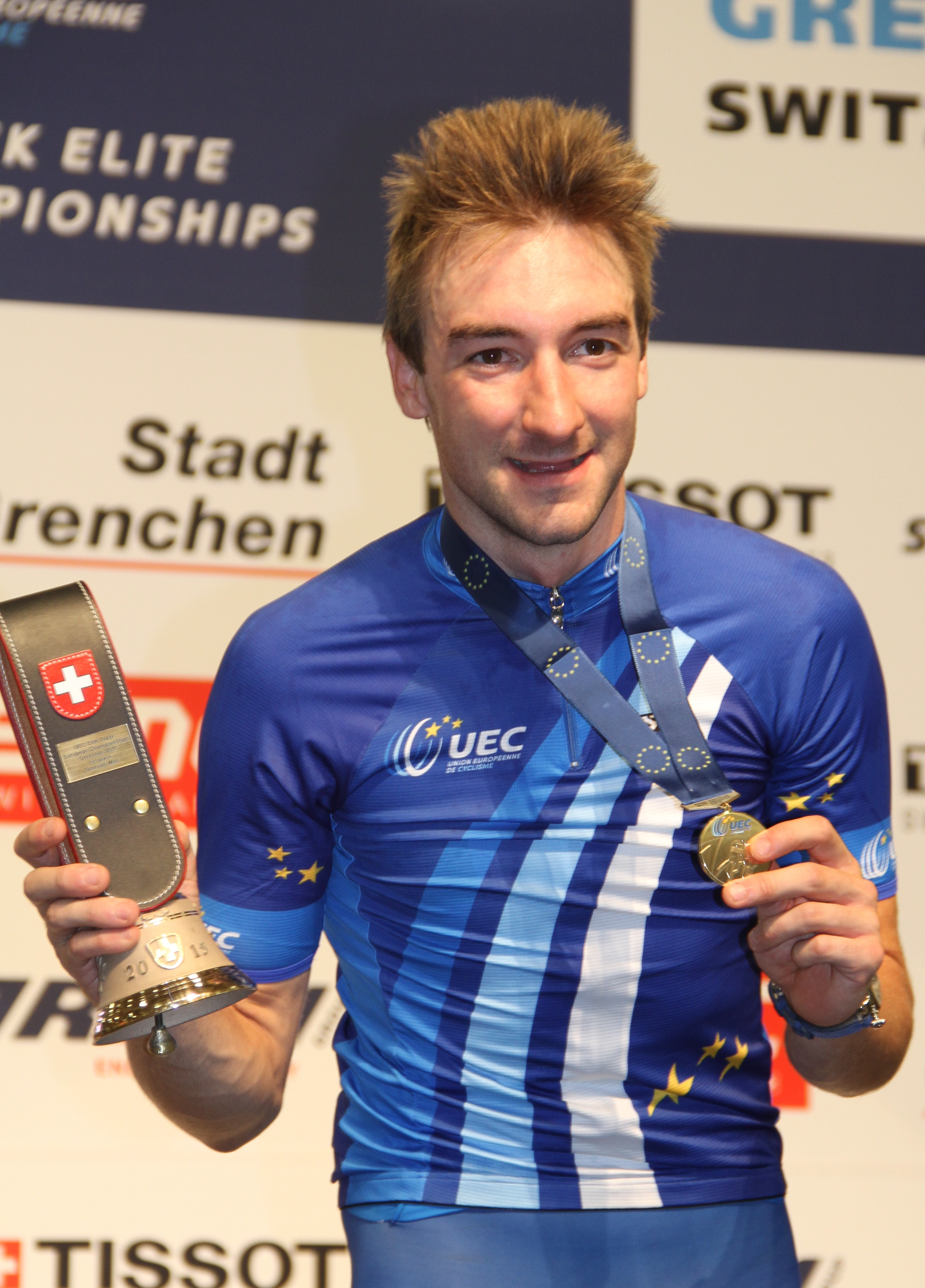 Elia Viviani, ital. Radsportler, Europameister im Omnium The making of this document was supported by the Community-Budget of Wikimedia Germany.